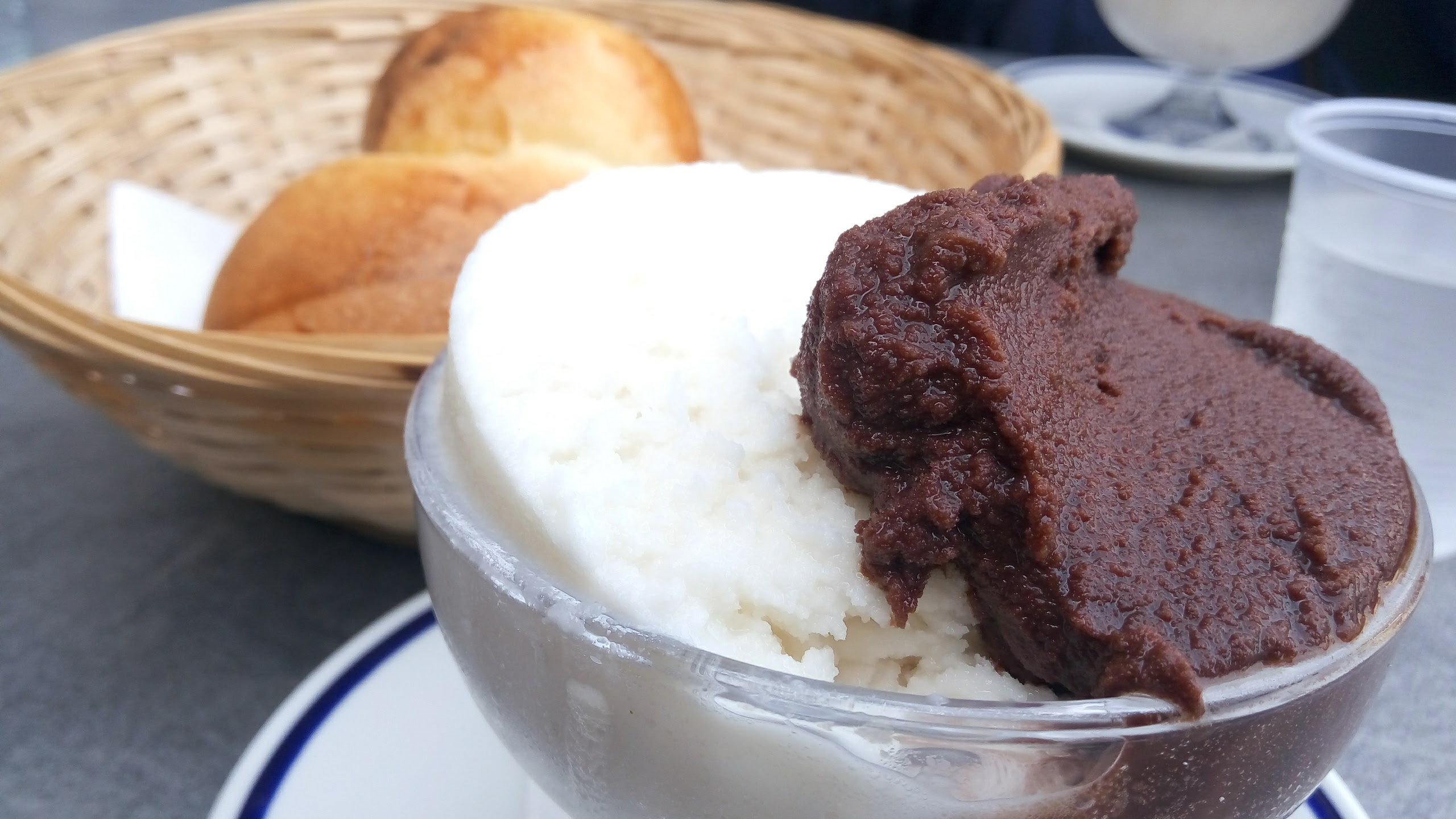 Dolce tipico estivo siciliano disponibile in vari gusti: mandorla, cioccolato, pistacchio, limone, caffè, melone, anguria, pesca, etc.